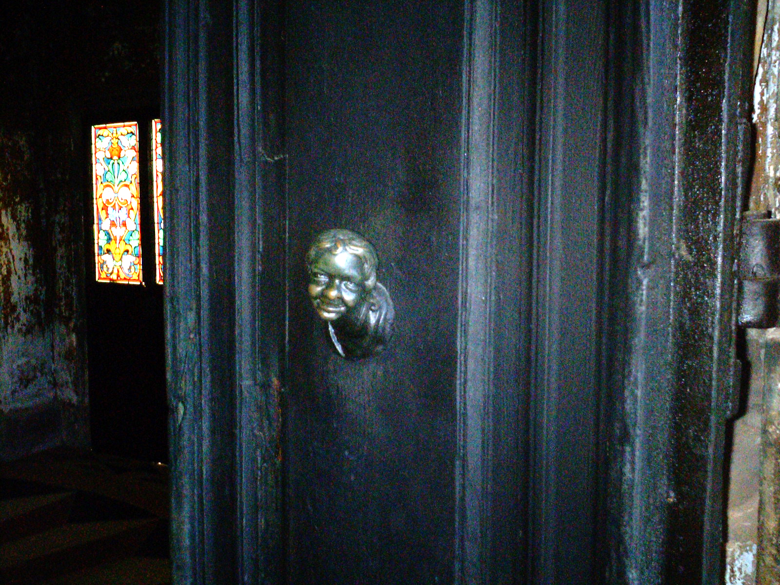 Ingresso del santuario di villa Duodo a Monselice, foto scattata da Roberto Fogliardi il 22/04/2006